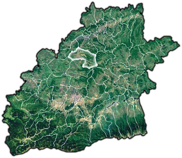 Seica Mare jud Sibiu